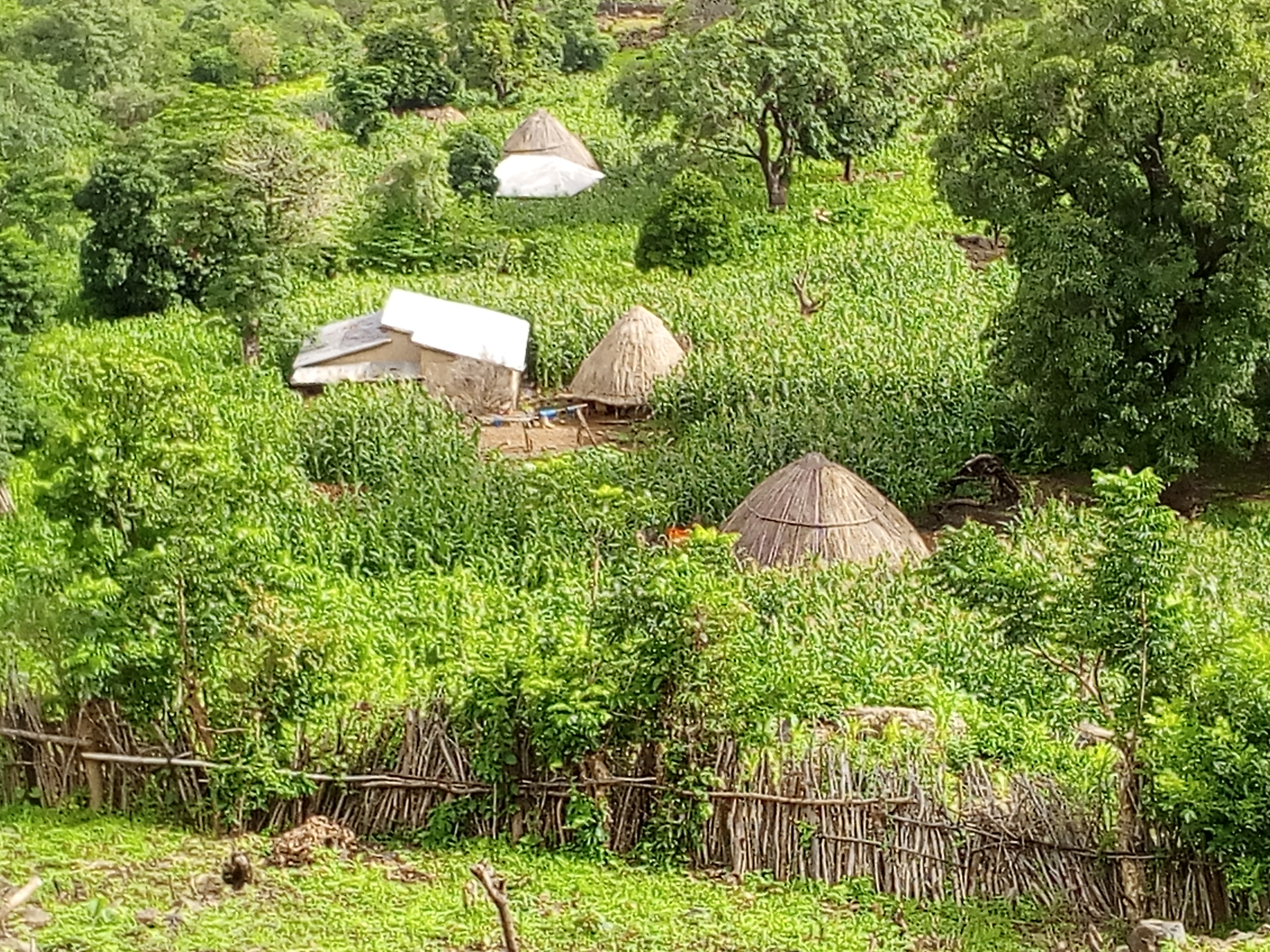 Petit village de Téliré